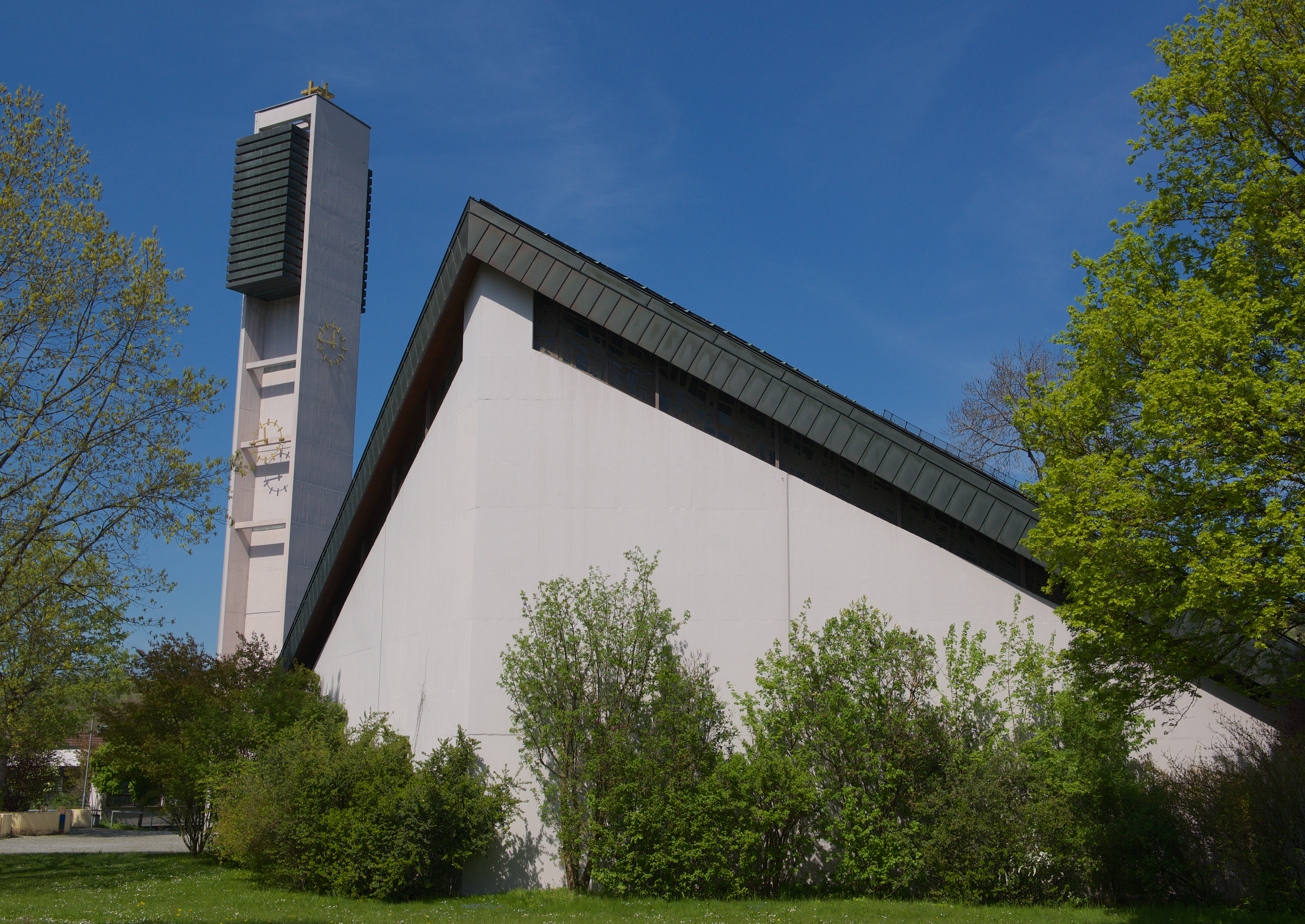 St. Leonhard Hussenhofen